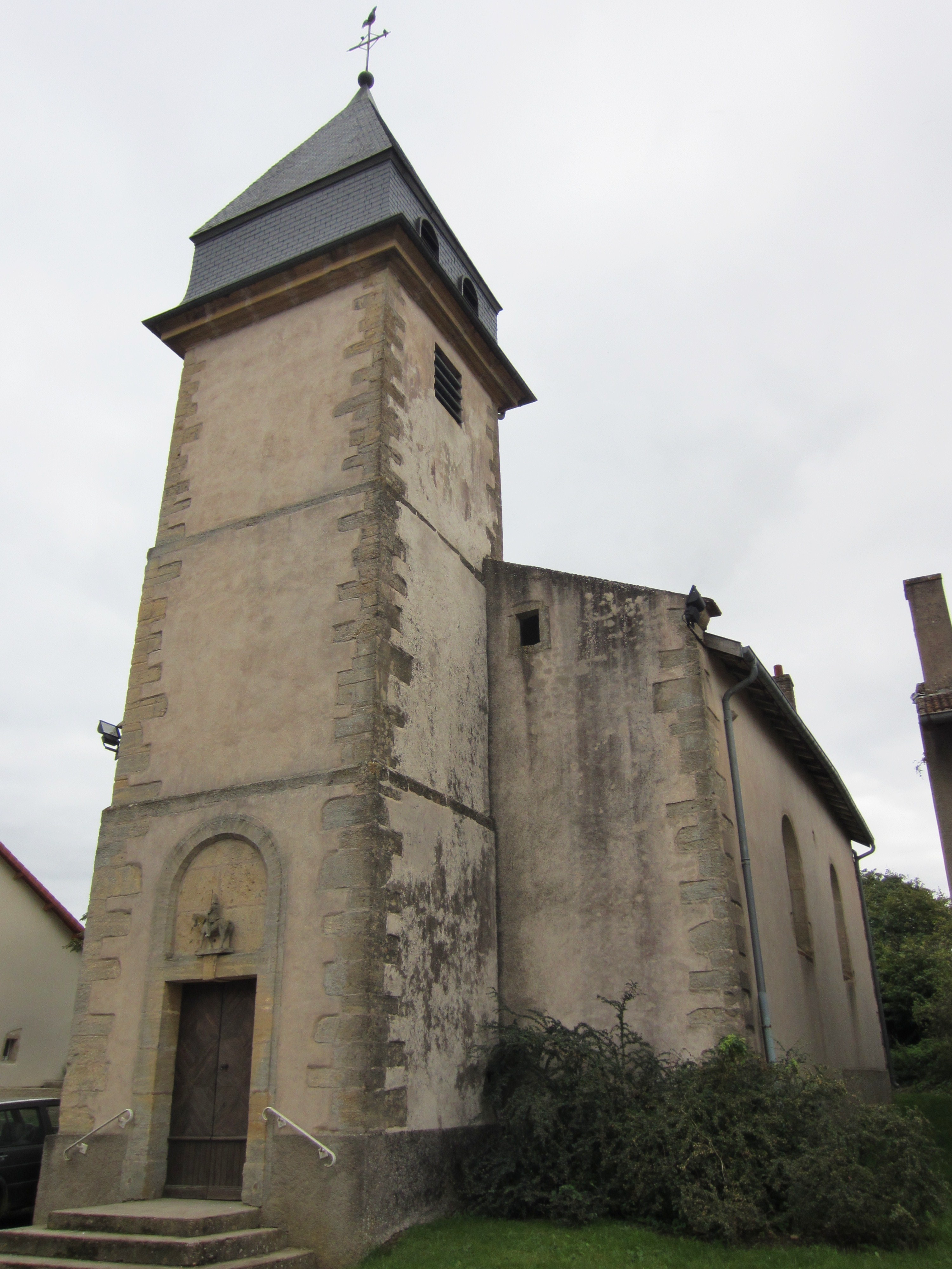 Description eglise Bettainvillers eglise Bettainvillers